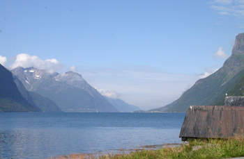 Bilete av Hjørundfjorden frå sør (i frå den delen som heiter Storfjorden ved Viddal). Du ser forbi Sæbøneset i vest og Leknes i aust, ut sør mot munningen og Ålesund kommune kommune (Flisnes og Emblem).